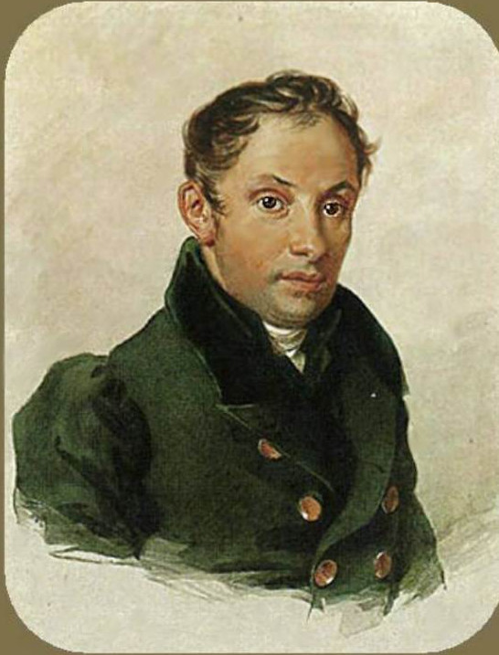 Соколов Петр Федорович. Портрет Жуковского Василия Андреевича. конец 1820-ых г